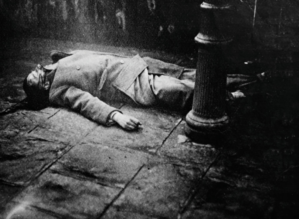 Трупът На Щерю Божинов, убит на улица "Цар Самуил" в София на 29 май 1933 г.